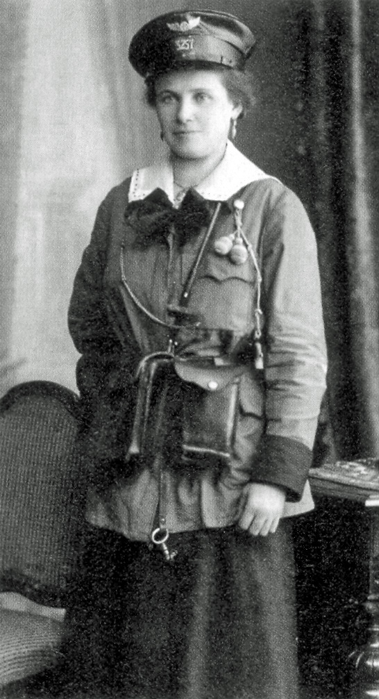 eine der ersten Münchner Trambahn-Schaffnerinen etwa aus dem Jahr 1917